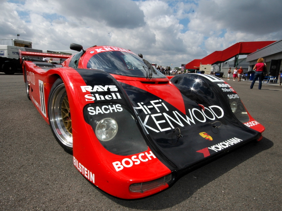 A Kremer-Porsche 962CK6 at Silverstone Circuit